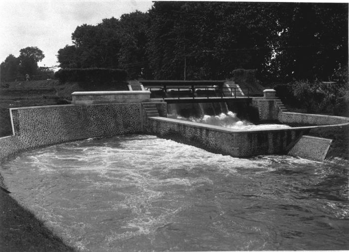 Foto. Waterwerken in Djember op Oost-Java de dam "djeding" Goemelar Baloeng